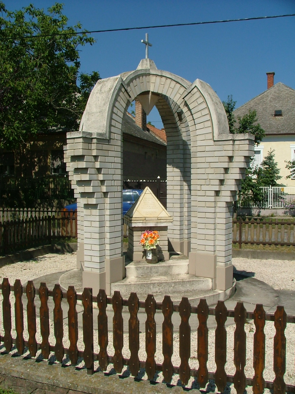 Rábaszentmiklósi II. világháborús emlékmű